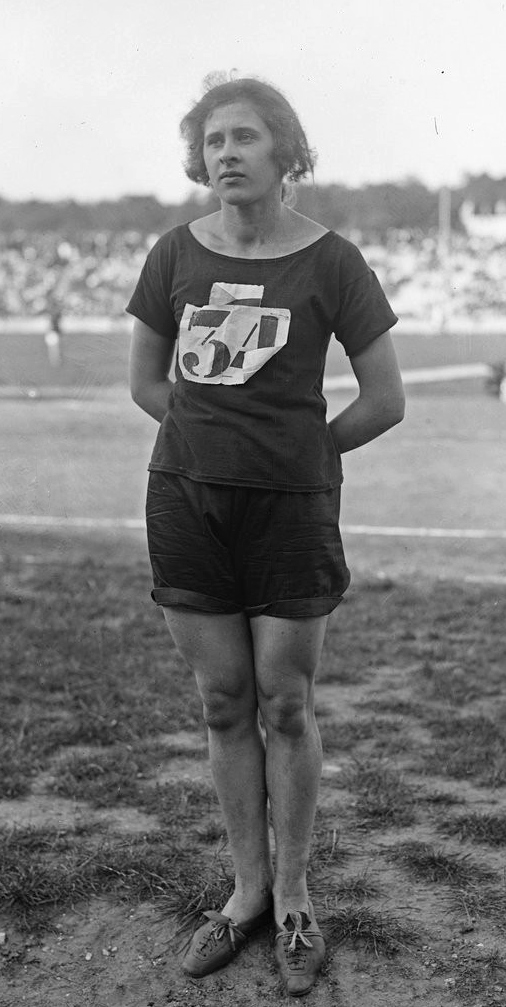 20-8-22, stade Pershing, Mlle [Marie] Mejzlikova II, gagnante du 60 m [meeting international d'athlétisme féminin] : [photographie de presse] / [Agence Rol]